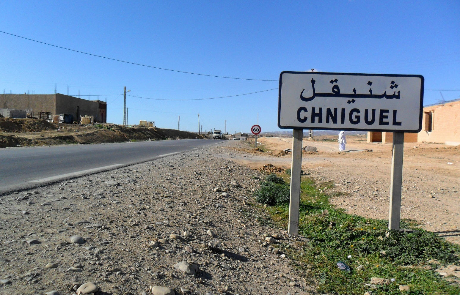 Chniguel شنيقل